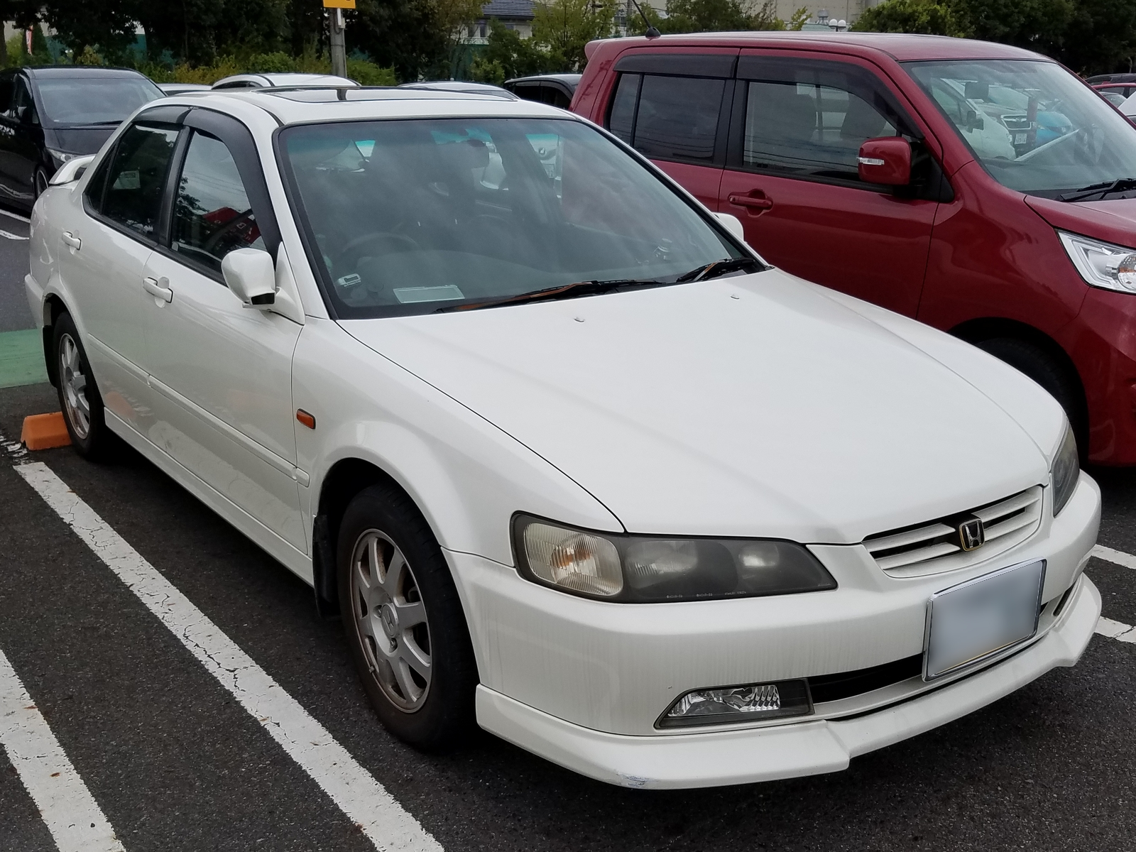 アコード SiR(前期型)